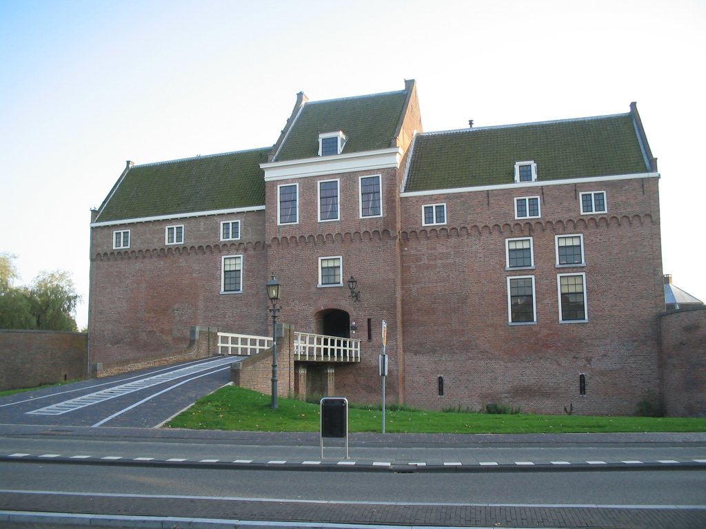 kasteel Woerden, 12 oktober 2005